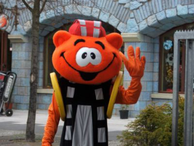 Flimmy